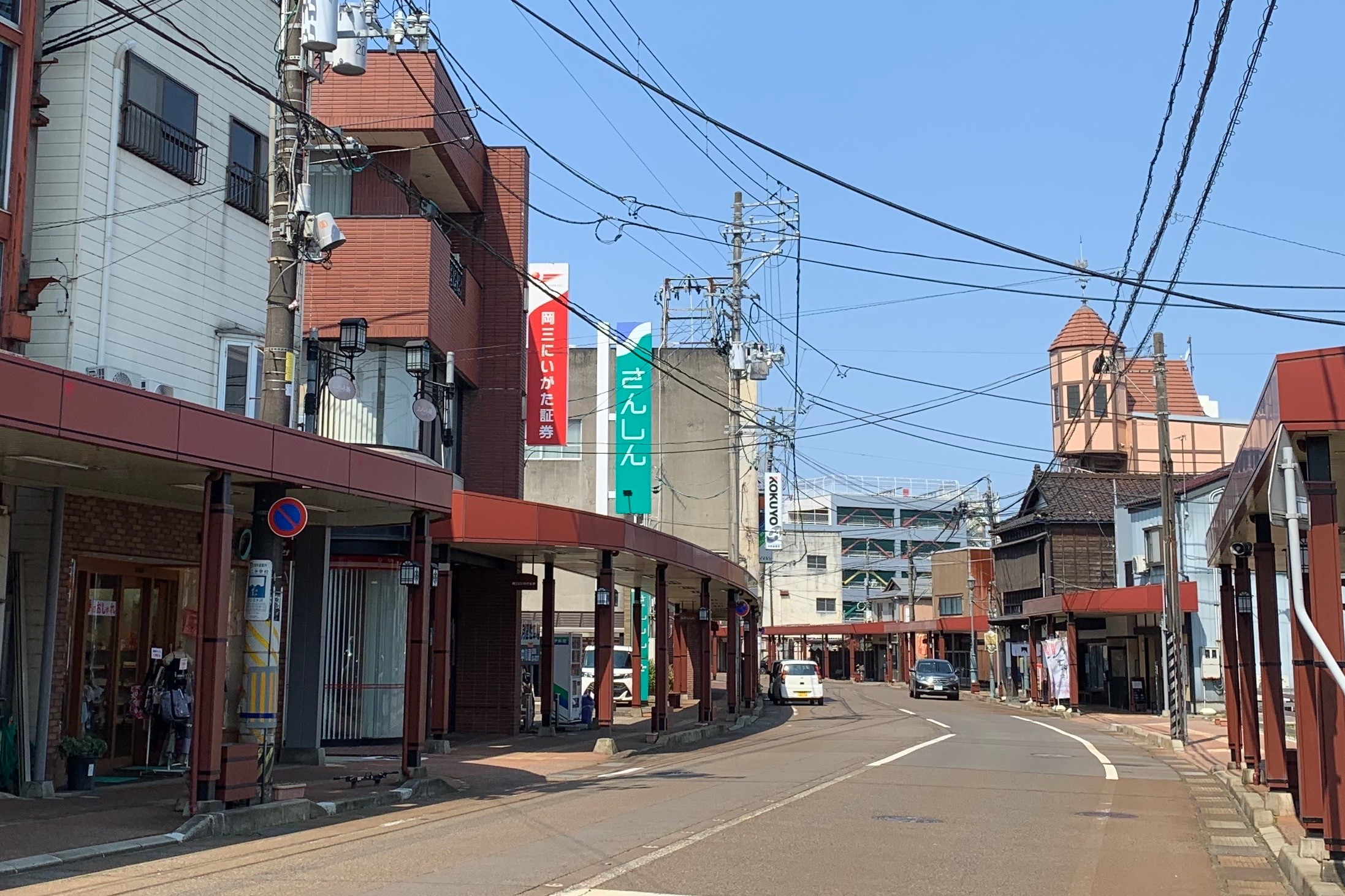 三条市の一の木戸商店街（2020年4月）新潟県道331号三条下田線